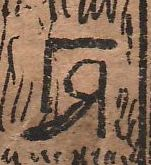 Беларуская (тарашкевіца): манаграма Язэпа Горыда на кнізе А. Грыневiча "Дзіцячы Сьпеўнік"